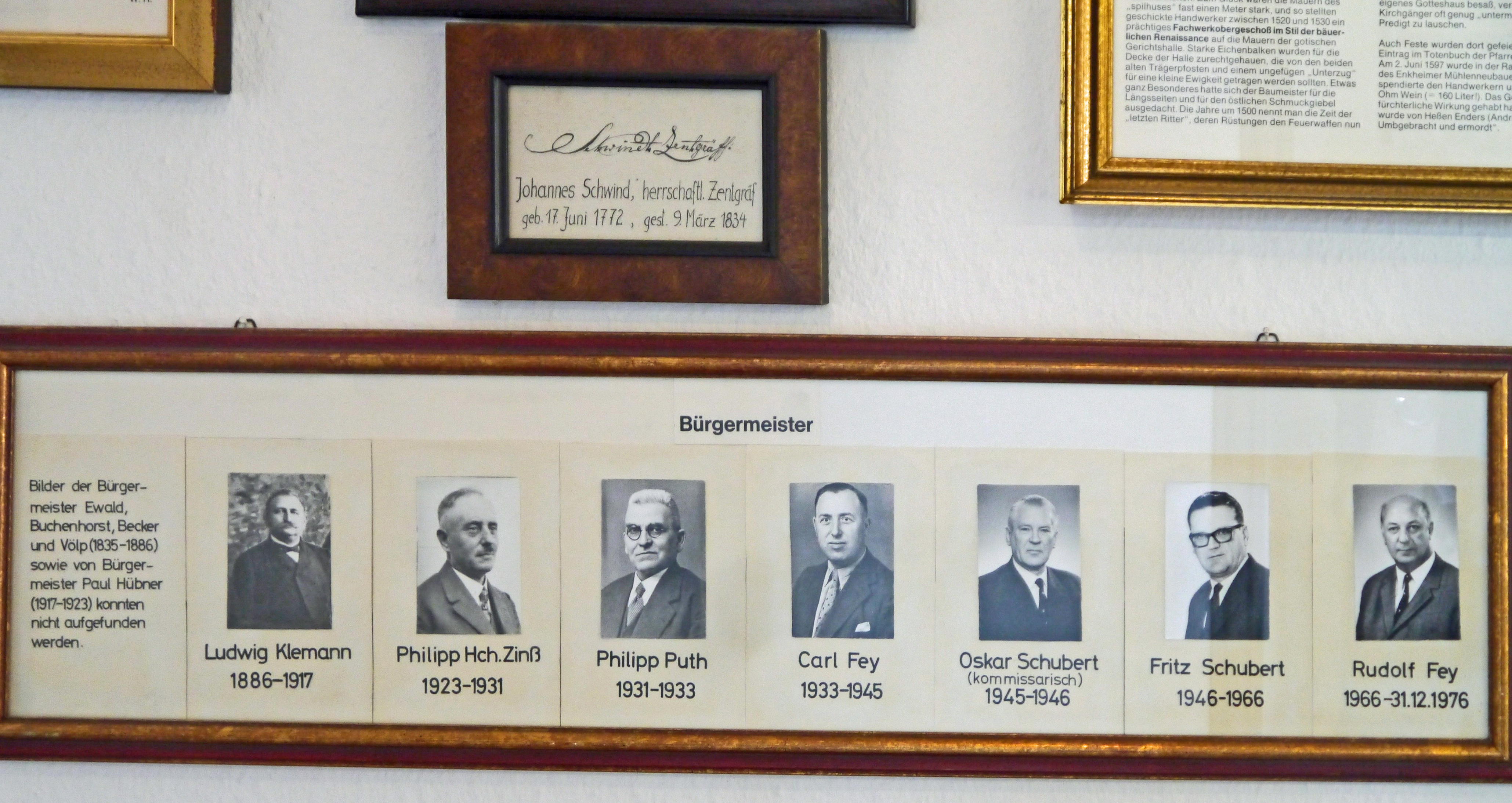 Die Bürgermeister von Bergen und Bergen-Enkheim zwischen 1835 und 1976. Im Heimatmuseum in Bergen.